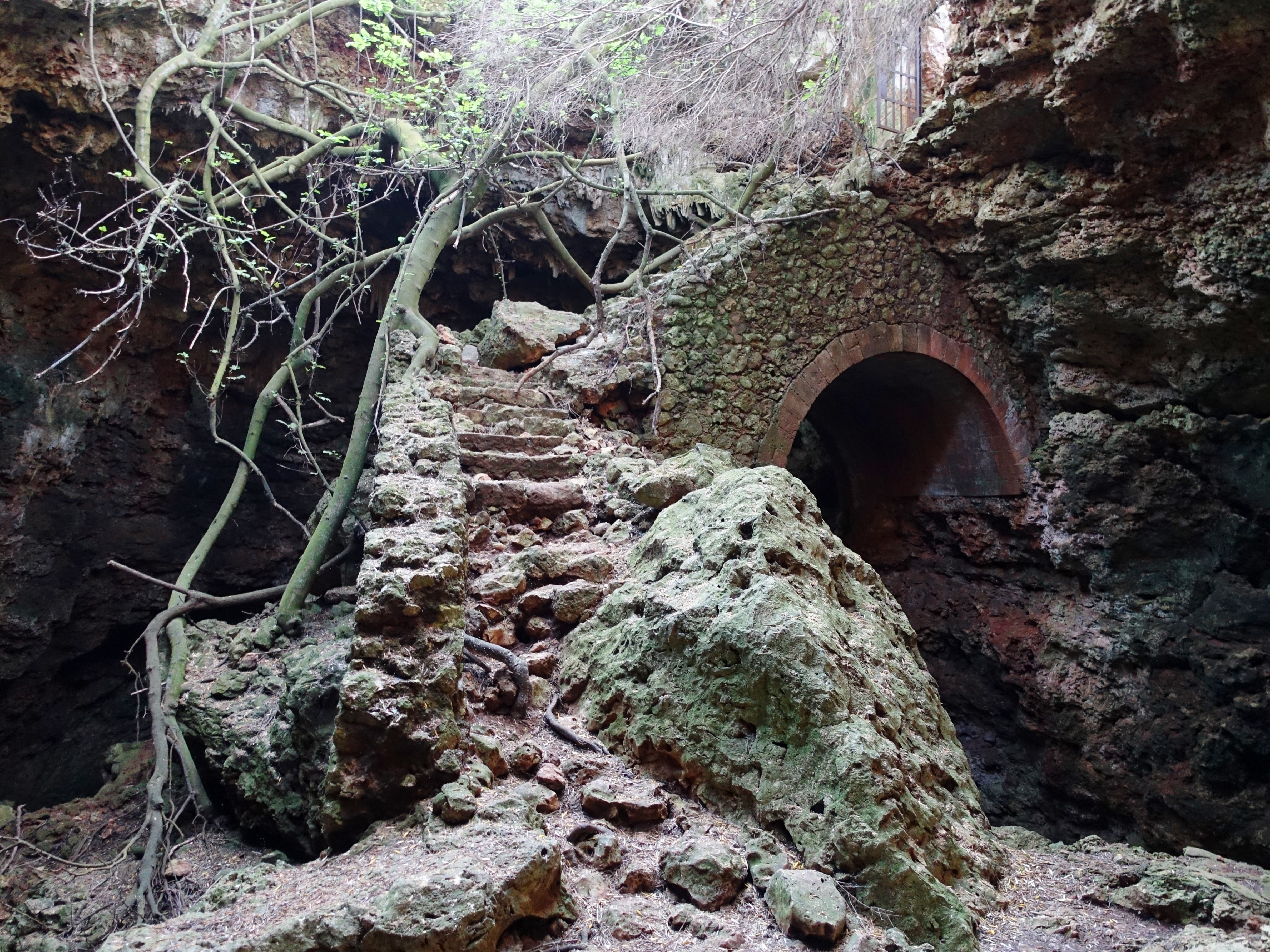 Abstieg zur Cova des Pont an der Ostküste von Mallorca, Spanien